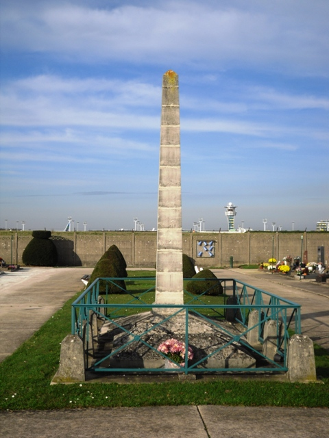 La pyramide sépulcrale du Maréchal de Vaux à Paray-Vieille-Poste (91)